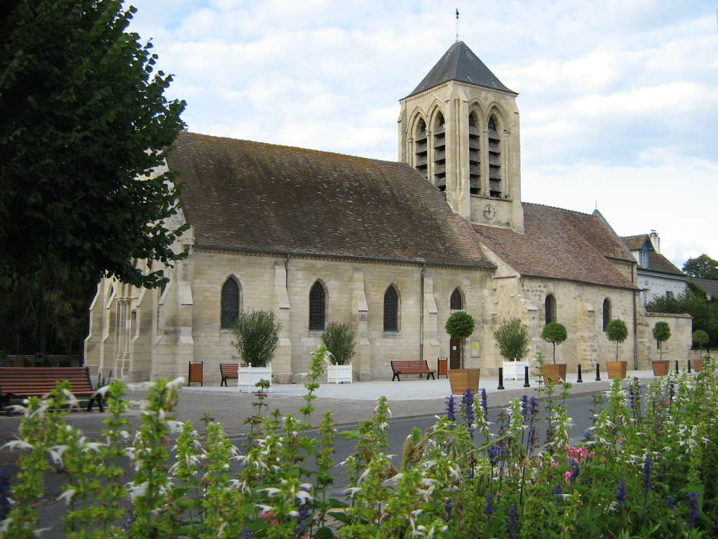 Eglise Saint-Pierre-aux-Liens à Osny (XIe et XIIIe siècles).